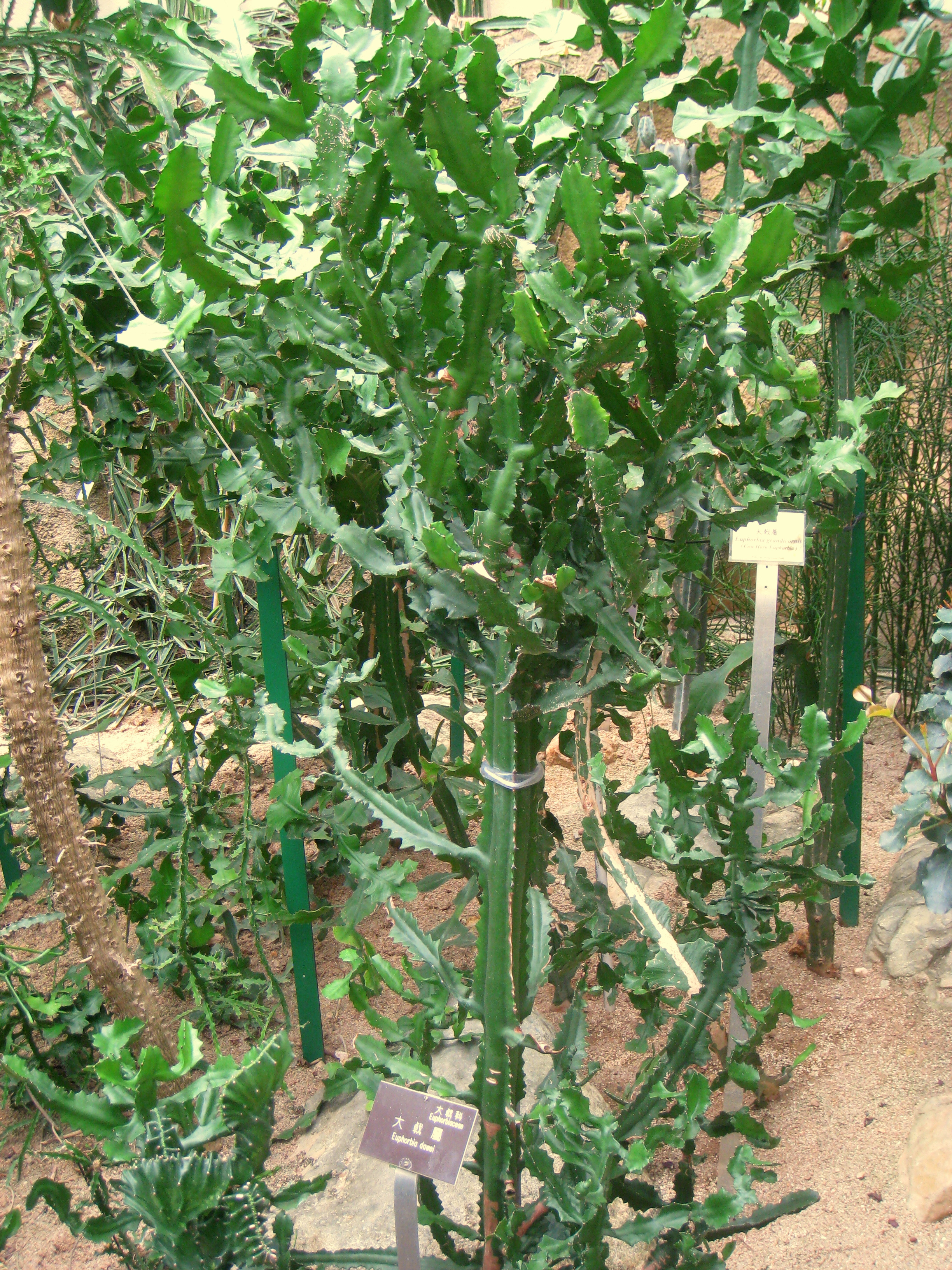 Euphorbia dawei. Hong Kong Park Conservatory in Hong Kong Park, Hong Kong.